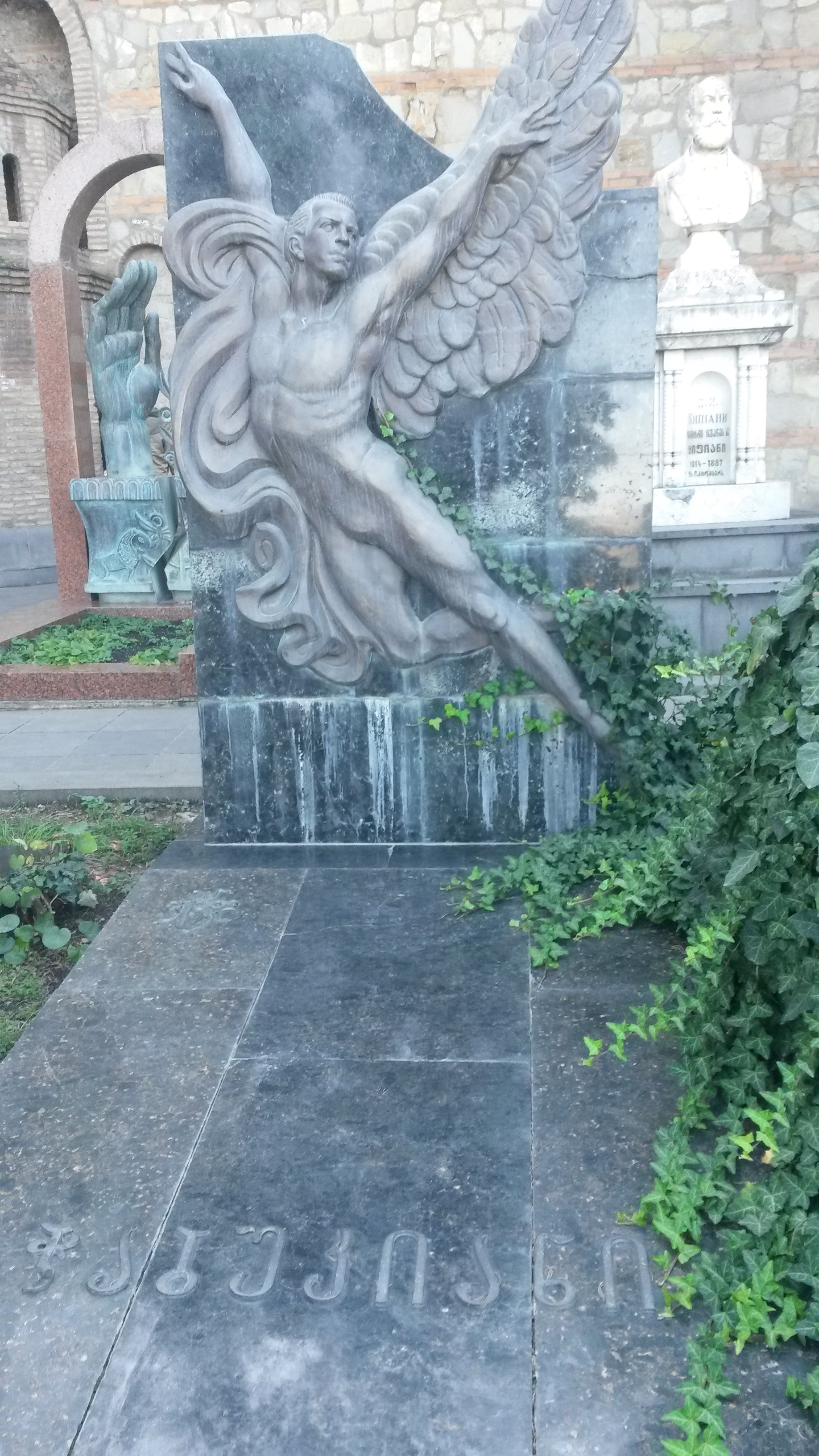 მთაწმინდის პანთეონი